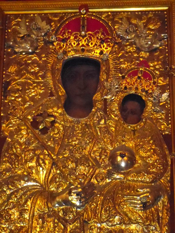 Cudowny Obraz Matki Bożej Zwycięskiej, kościół św. Wojciecha w Brdowie (woj. wielkopolskie).